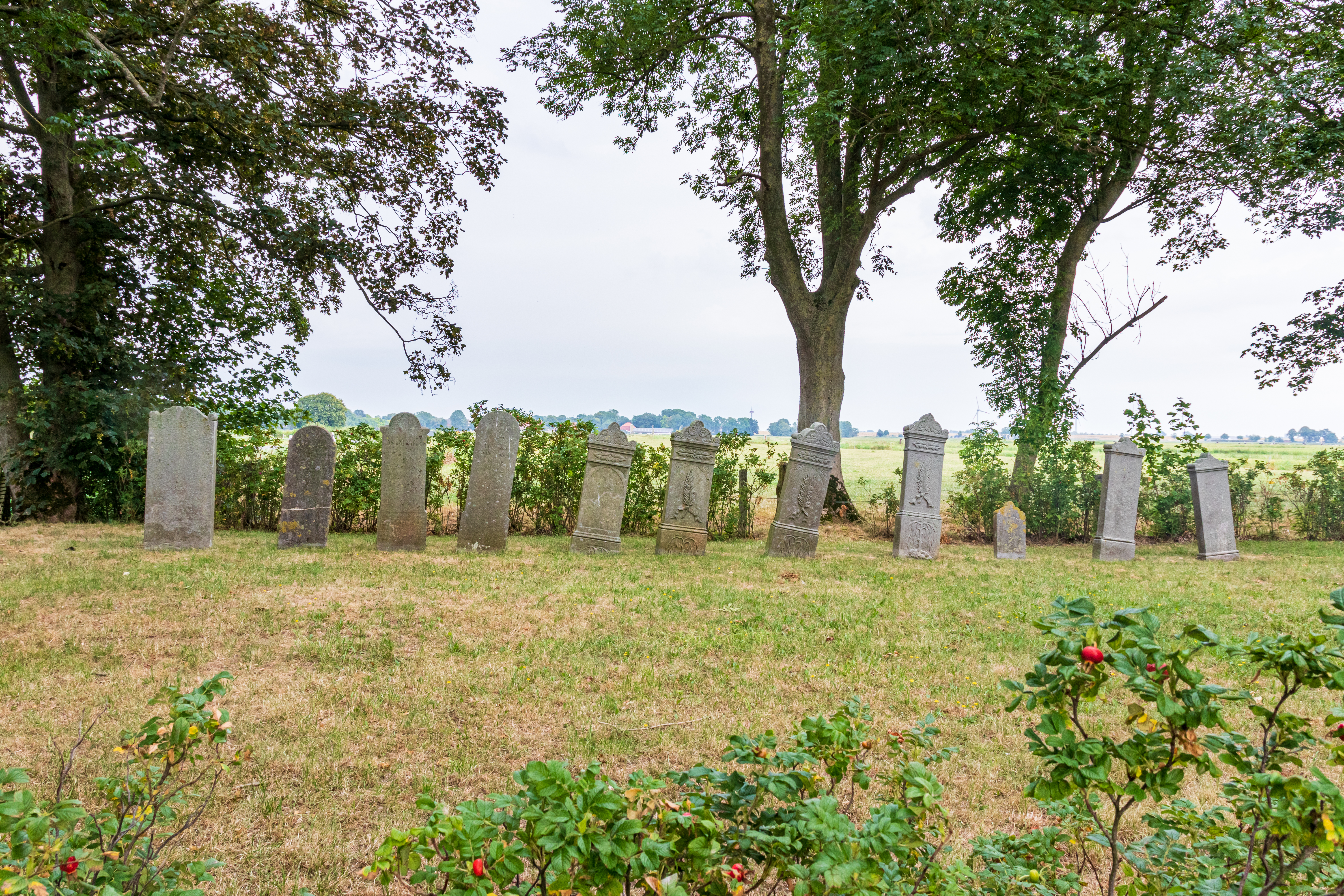 Der Jüdische Friedhof Jemgum liegt abseits des Ortes. Er ist ein Jüdischer Friedhof mit 13 Grabsteinen aus Sandstein aus dem Ende des 19. Jahrhunderts bis in die 30er Jahre des 20. Jahrhunderts; Anlage mit Bodenwölbung und umgebenden Baumbestand